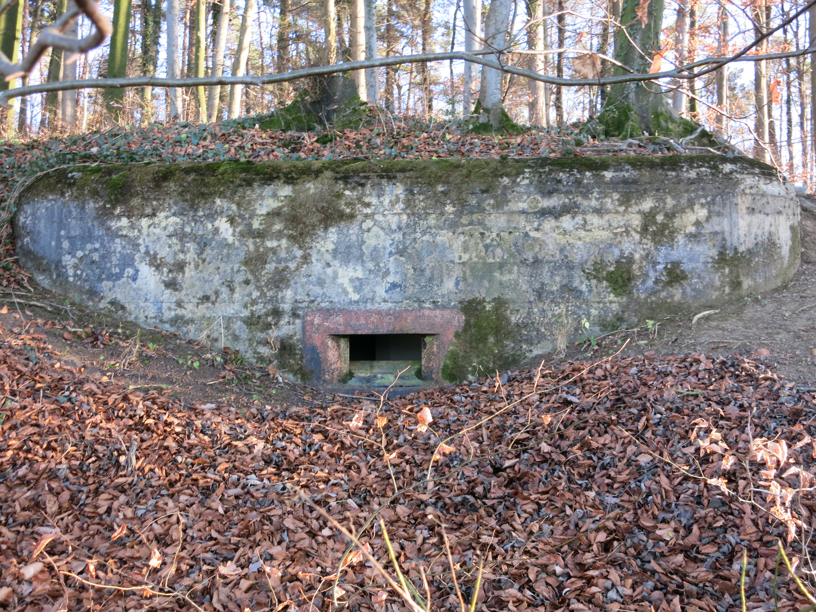 Artilleriebeobachtungsbunker Schürhof Ost, Urdorf ZH, Schweiz